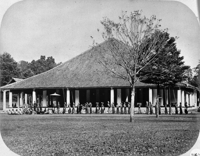 Foto. De hofhouding van de Bupati van Magelang met allerlei attributen die eigendom zijn van de vorst.